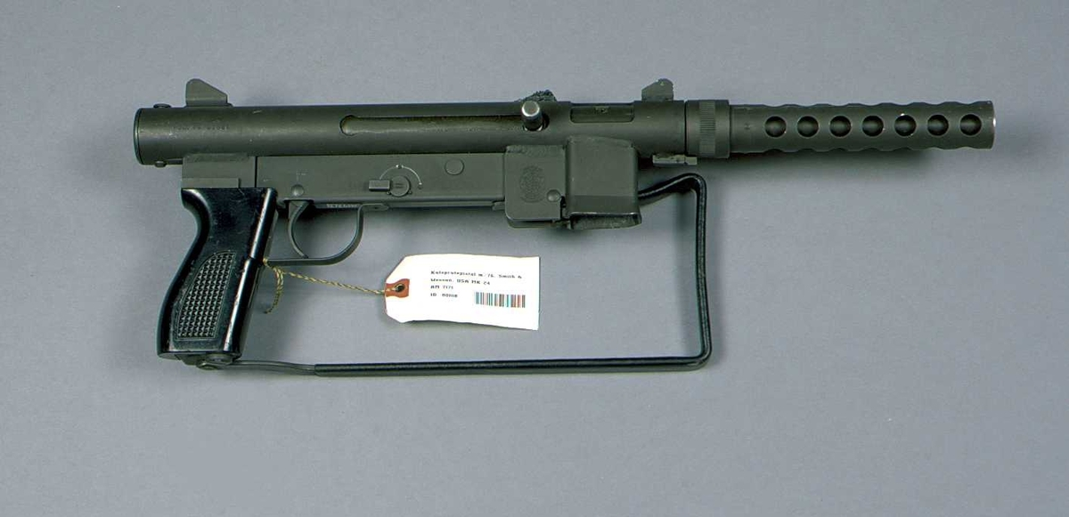 Kulsprutepistol Smith & Wesson M76, framtagen för den Amerikanska Flottan. Kaliber 9 x 19 mm Nato. Tillverkningsnr U1681. Märkt "U.S.A. Marcas registradas Smith & Wesson Springfield, Mass MOD. 76 U 1681". Vapnets längd med kolven infälld 515 mm. Smith & Wesson M76 konstruerades i och med att Sverige stoppade försäljningen av Kpist m/45B till USA 1966. M76 tillverkades från 1967 till 1974 och användes i mindre skala av amerikanska styrkor i Vietnam.